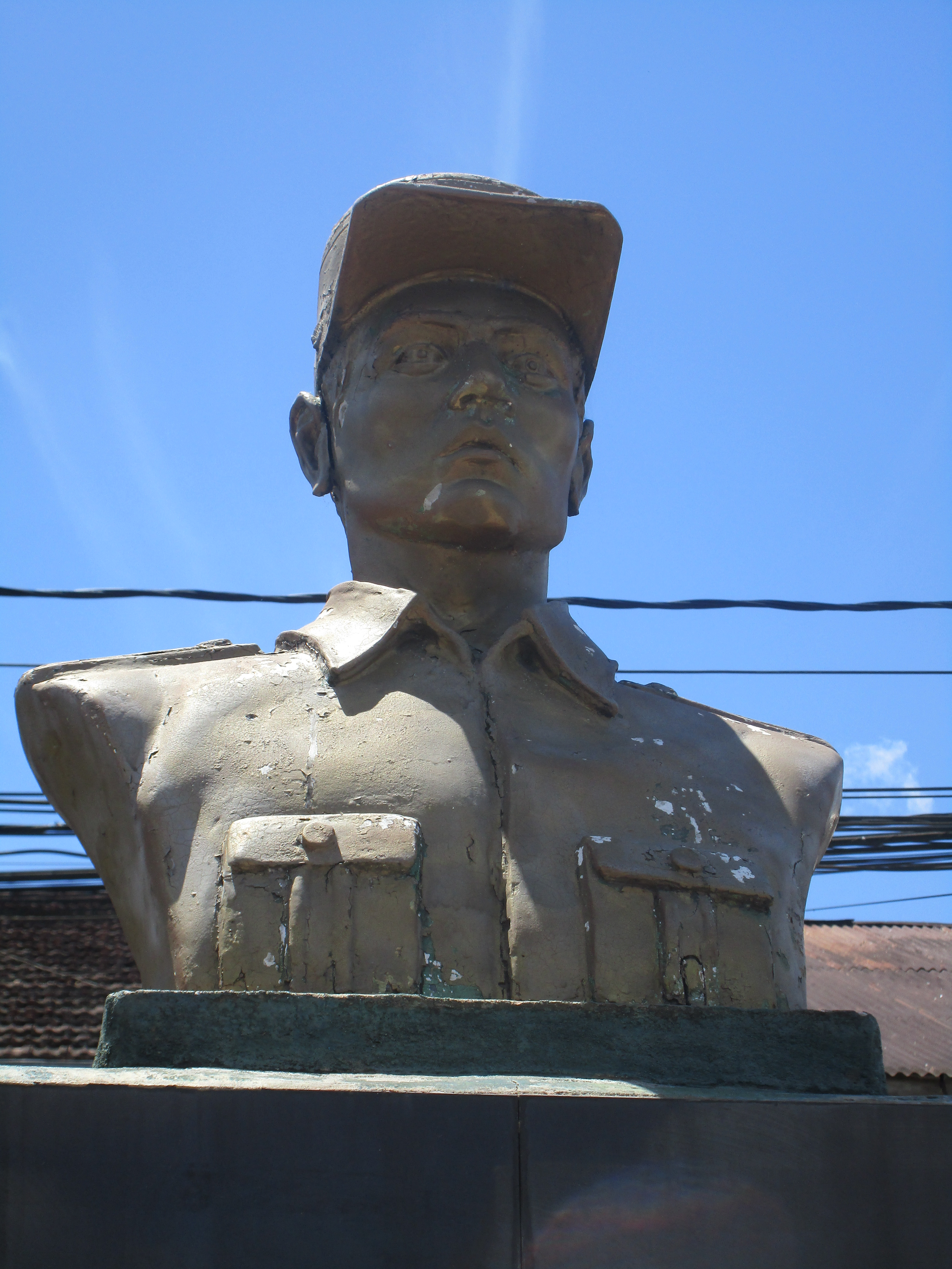 Busto de Víctor Pantoja Padilla en el paseo de los héroes amazónicos en Iquitos